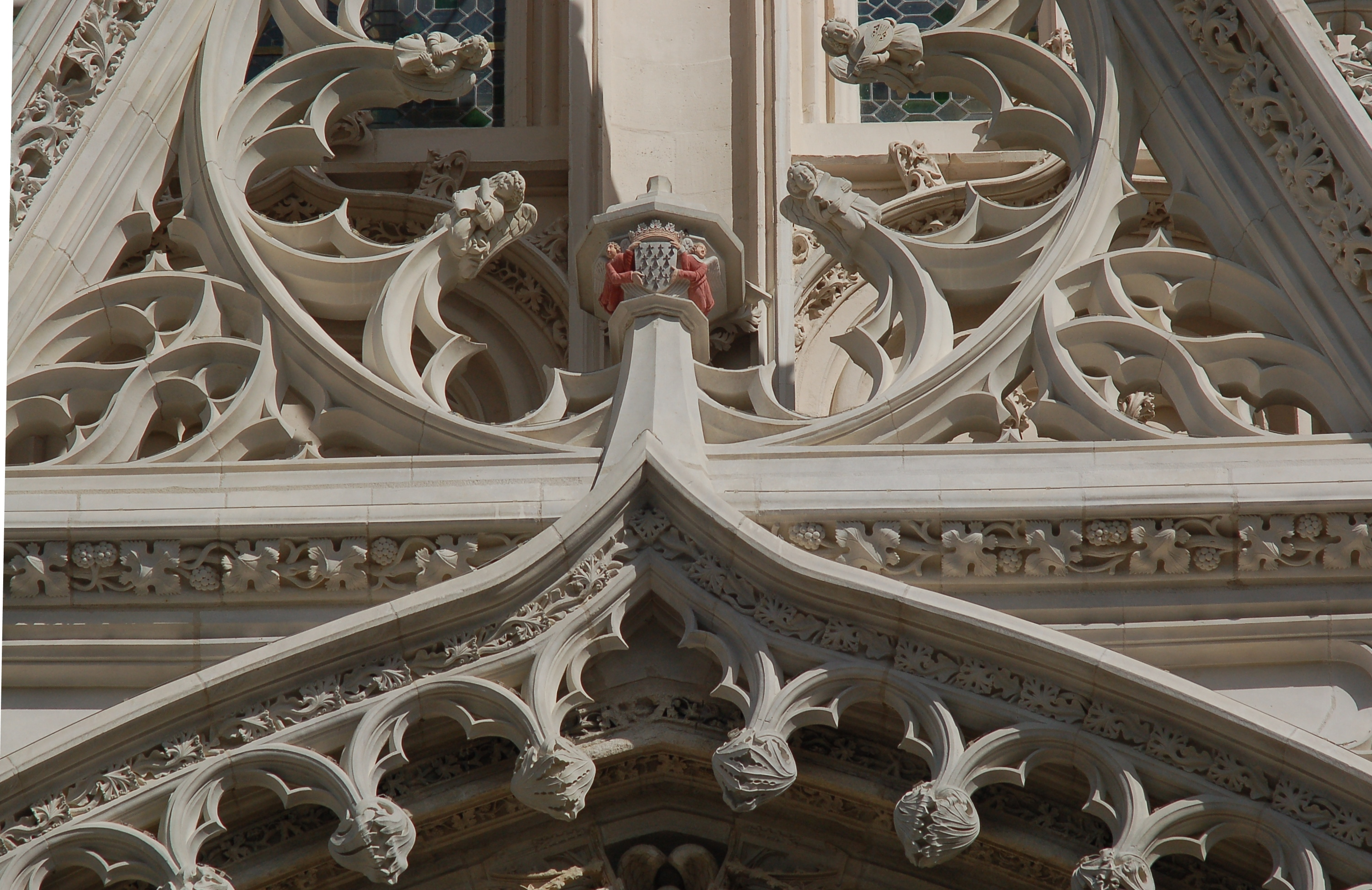 Détail du portail Ouest de la Cathédrale Saint Pierre de Nantes